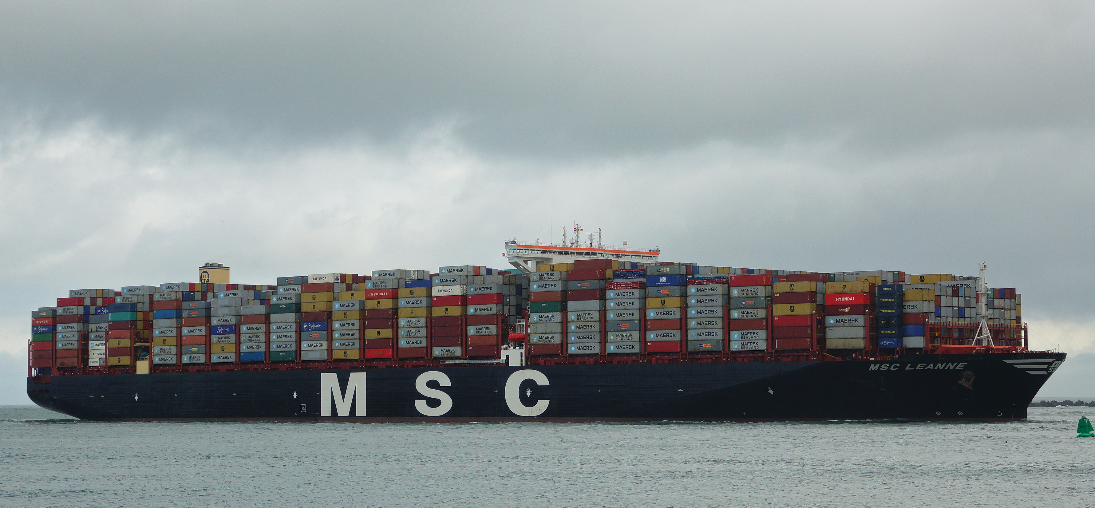 Maasmond 30-7-2017